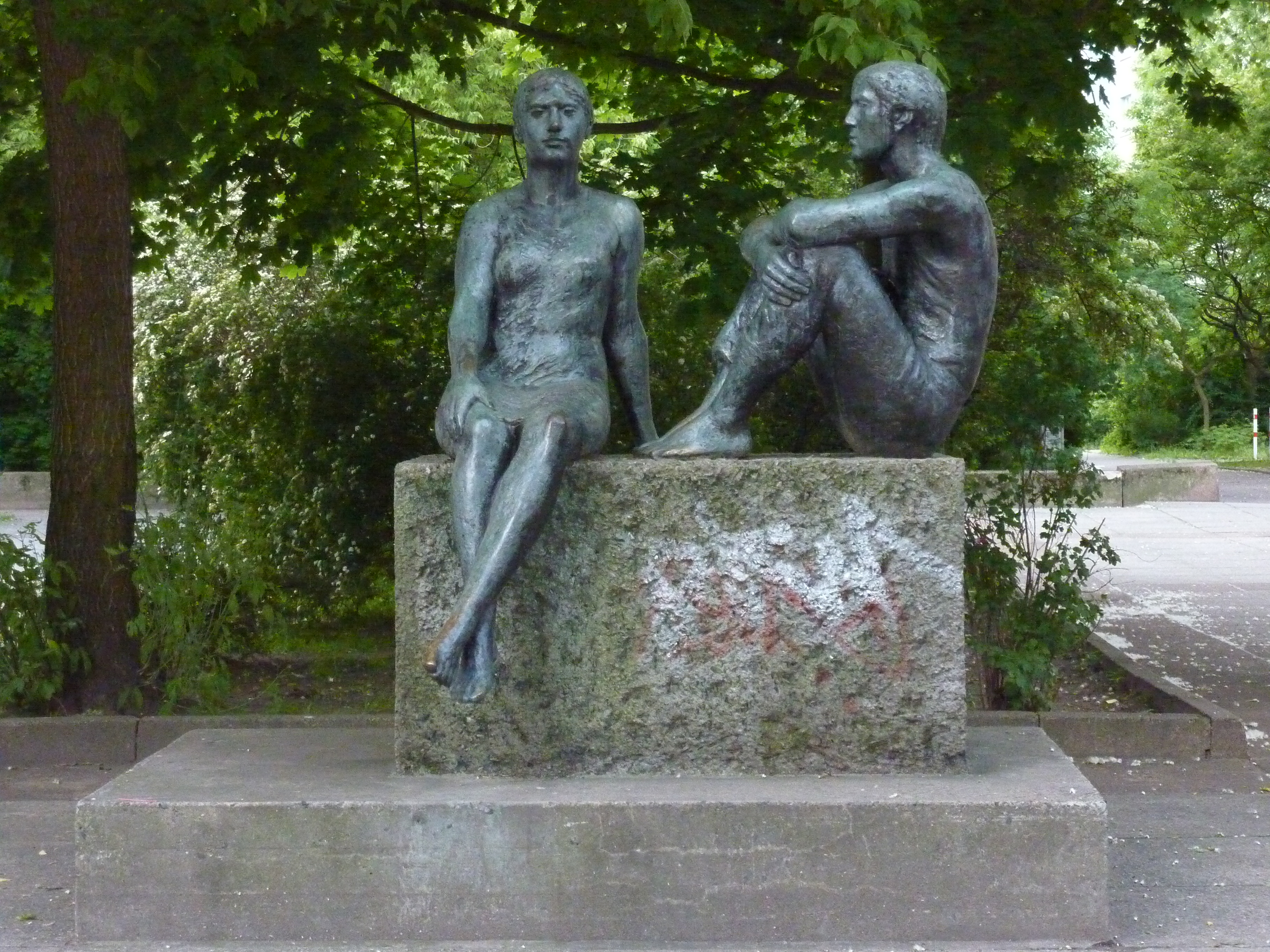 Bronzeplastik 'Junges Paar' von Rolf Winkler aus dem Jahr 1976. Auf dem Stadtplatz Dolgenseestraße in Berlin-Friedrichsfelde, zwischen den Wirtschaftsgebäuden Dolgenseestraße 8/8A und 11, Blickrichtung Osten.